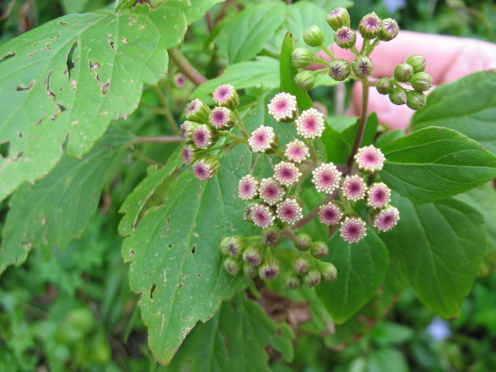 Drüsiger Wasserdost (Ageratina adenophora) - Buds